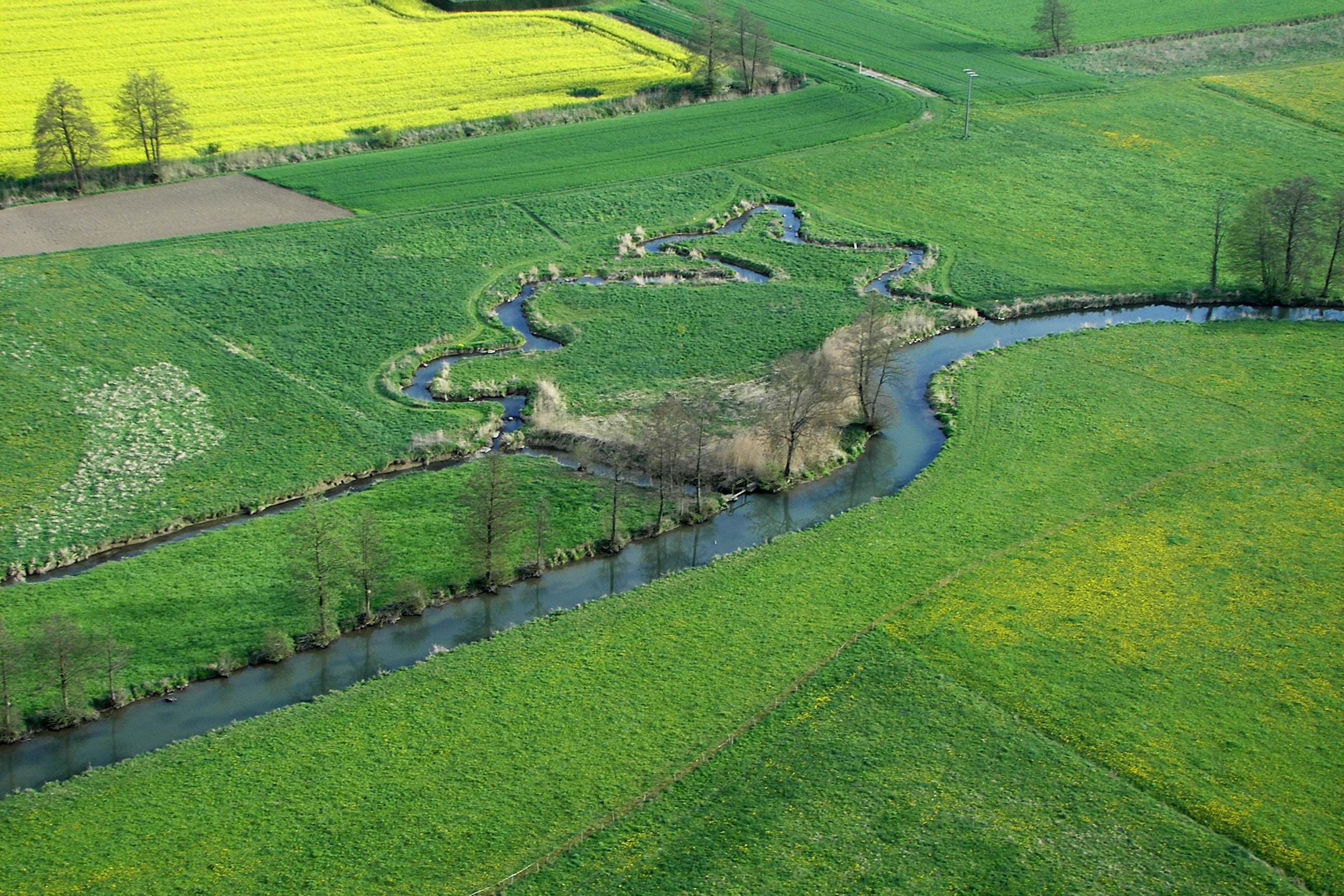 Kleine Laber. Laberwindungen zwischen Niederlindhart und Mallersdorf.